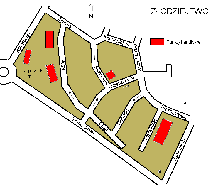 Śrem, Złodziejewo, plan.